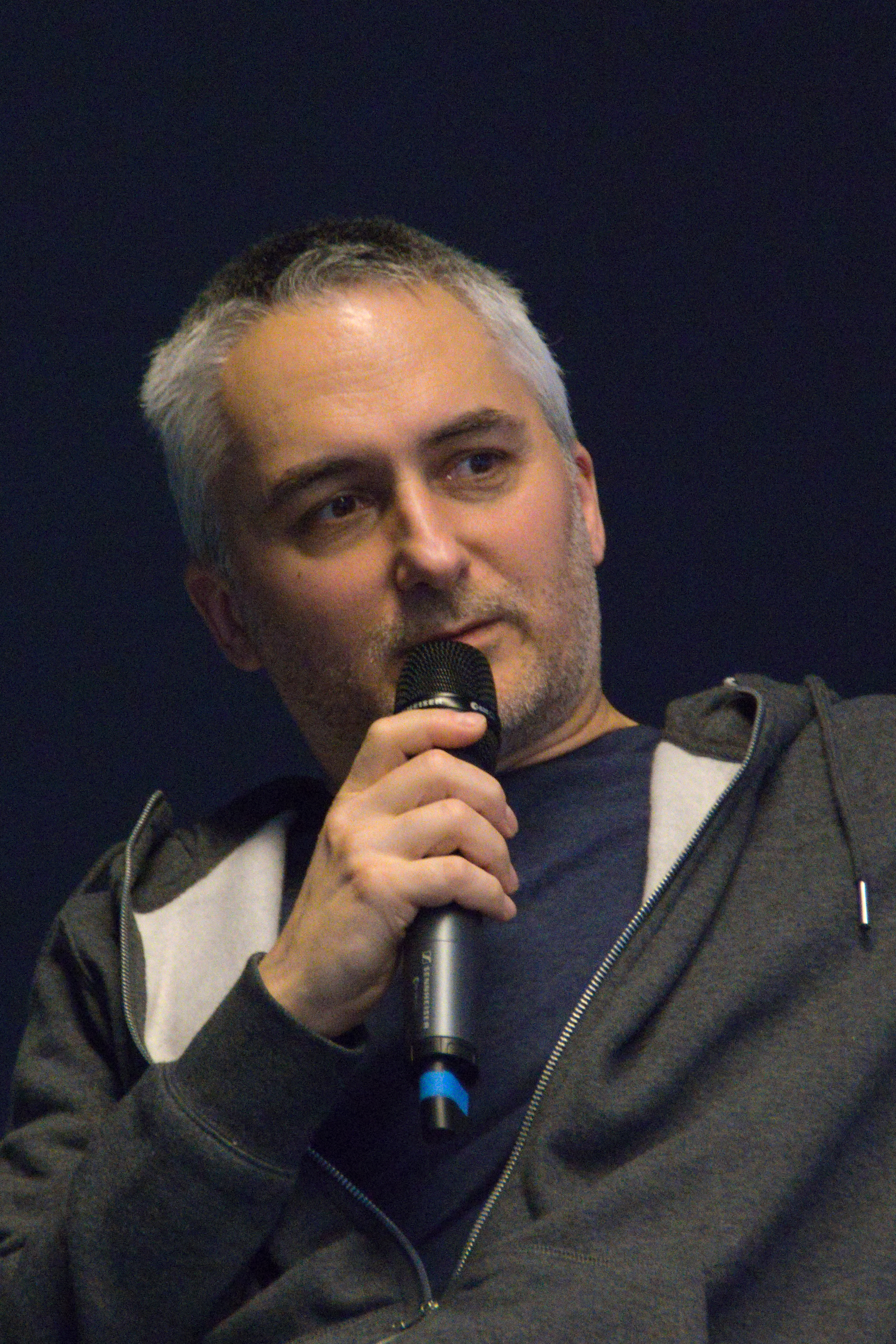 Dariusz Gzyra – polski działacz społeczny na rzecz praw zwierząt, publicysta podczas otwartego spotkania na festiwalu Veganmania w katowickim Spodku, w którym udział brali także Jaś Kapela i Orestes Kowalski